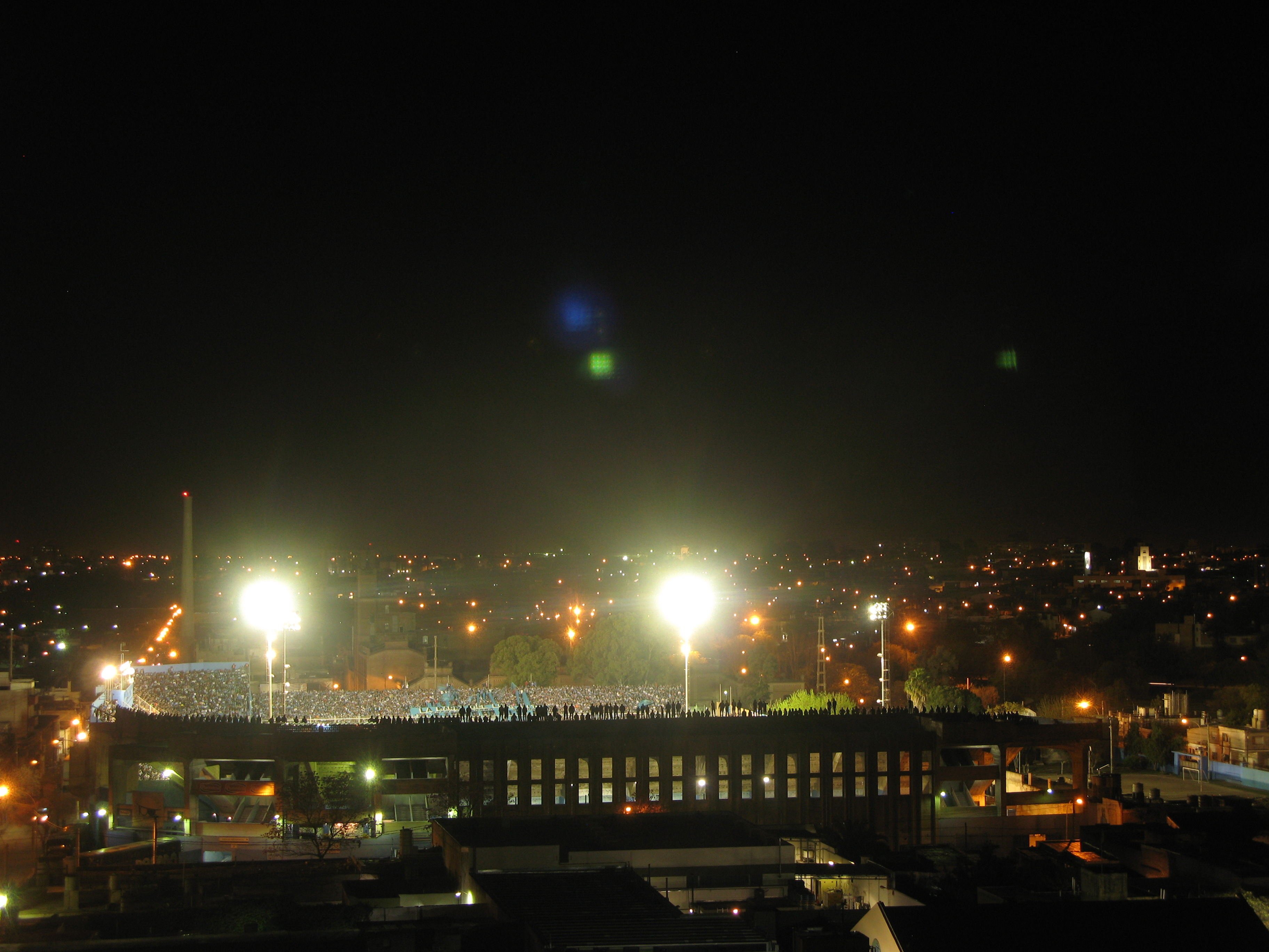 Club Atlético Belgrano, Barrio Alberdi, Córdoba, Argentina